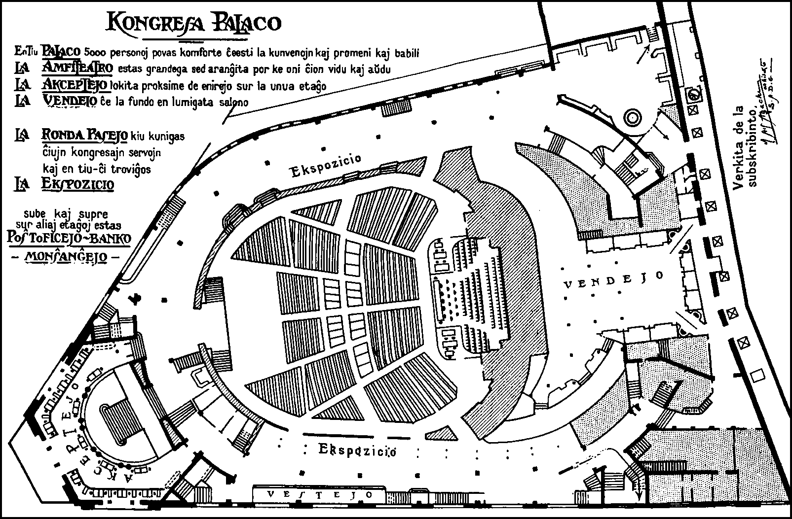 Aménagement intérieur du Gaumont-Palace pour le 10ème congrès mondial d'espéranto (1914) - Source : Manlibro de la kongresano (Livret du congressiste)